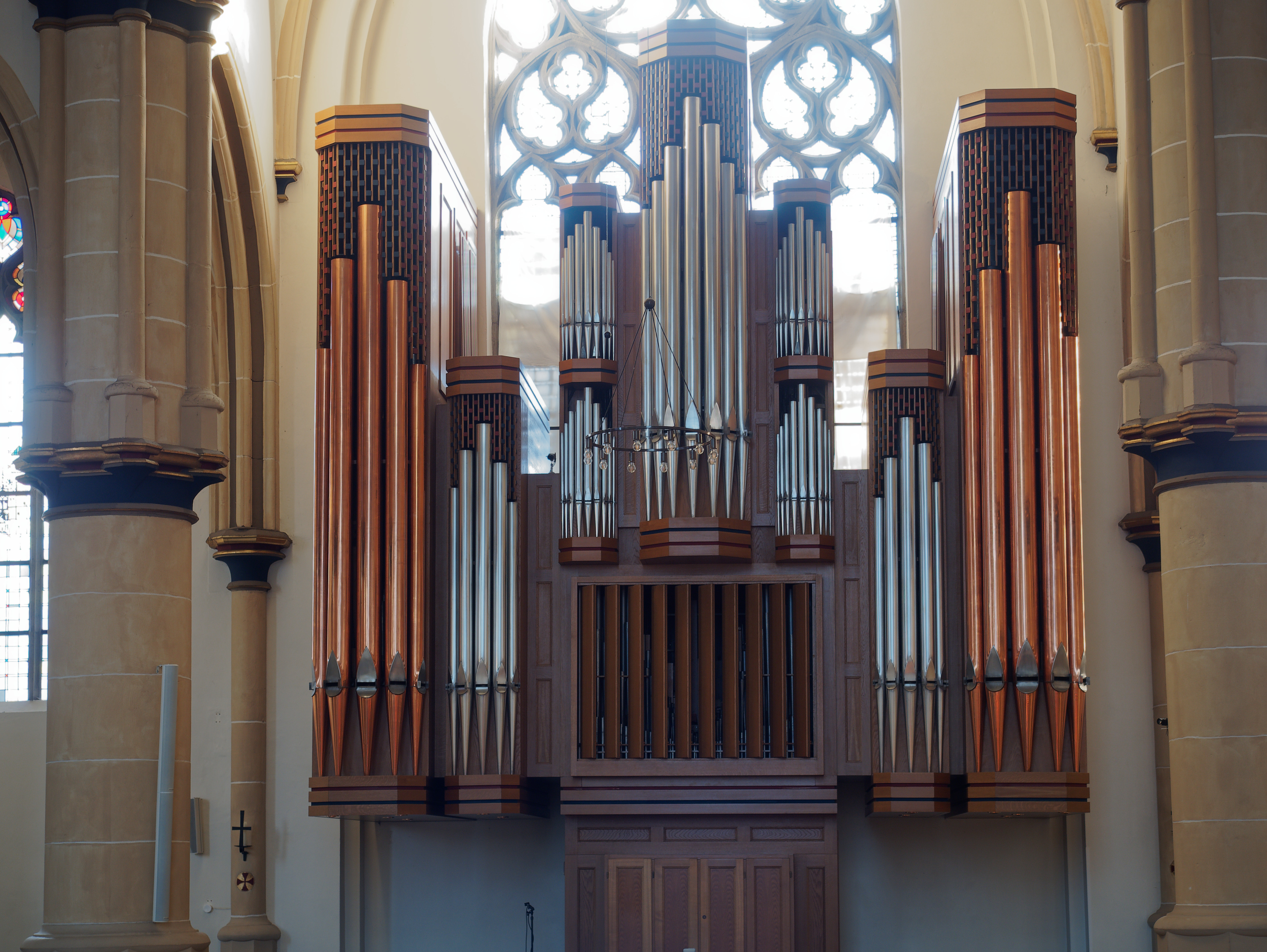 Waltrop, St. Petrus, die Orgel in der katholischen Kirche